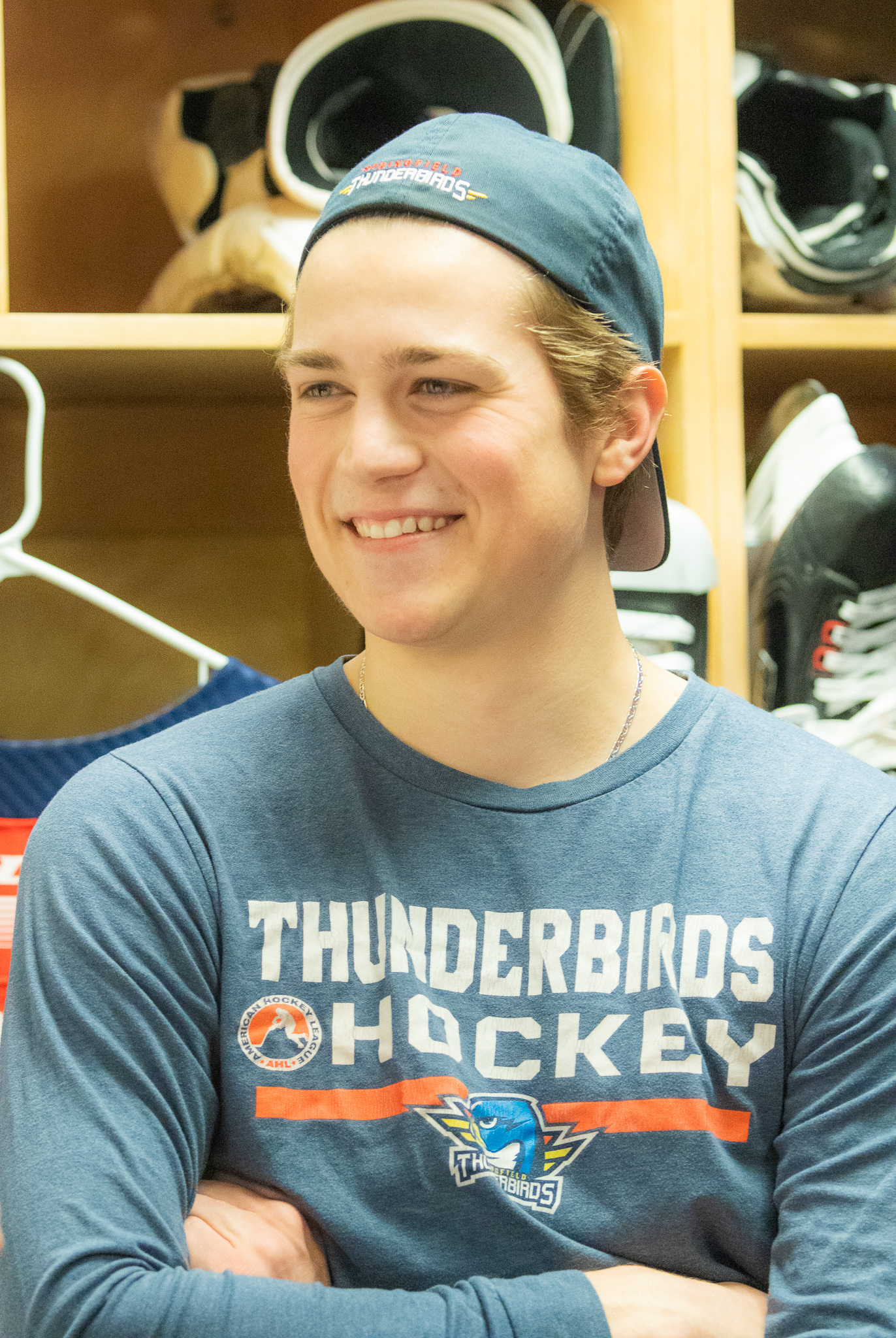 Samuel Montembeault